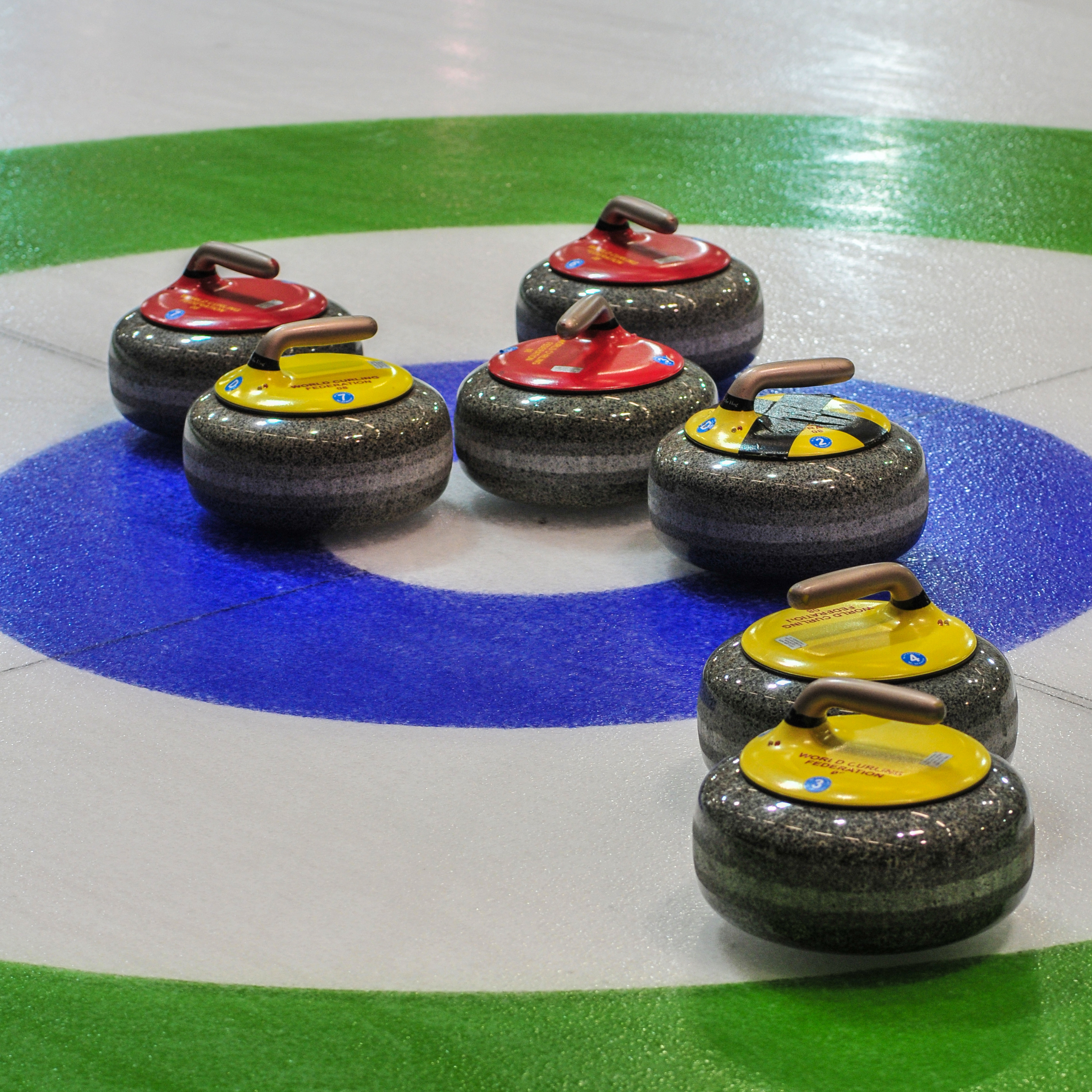 1. Jugendolympiade 2012 Innsbruck Erste Olympische Jugend- Winterspiele 201213. bis 22. Jänner in Innsbruck Dieses Foto wurde durch die Unterstützung von Wikimedia Österreich und die Twoonix Software GmbH ermöglicht.